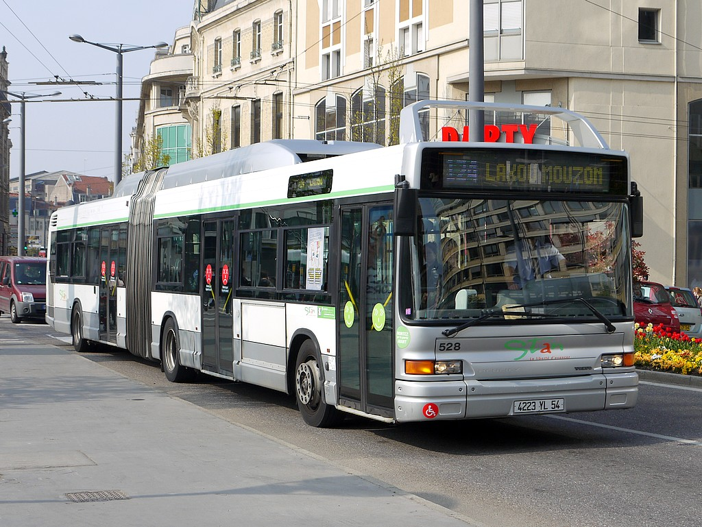 Heuliez GX417 au gaz naturel du réseau de Nancy